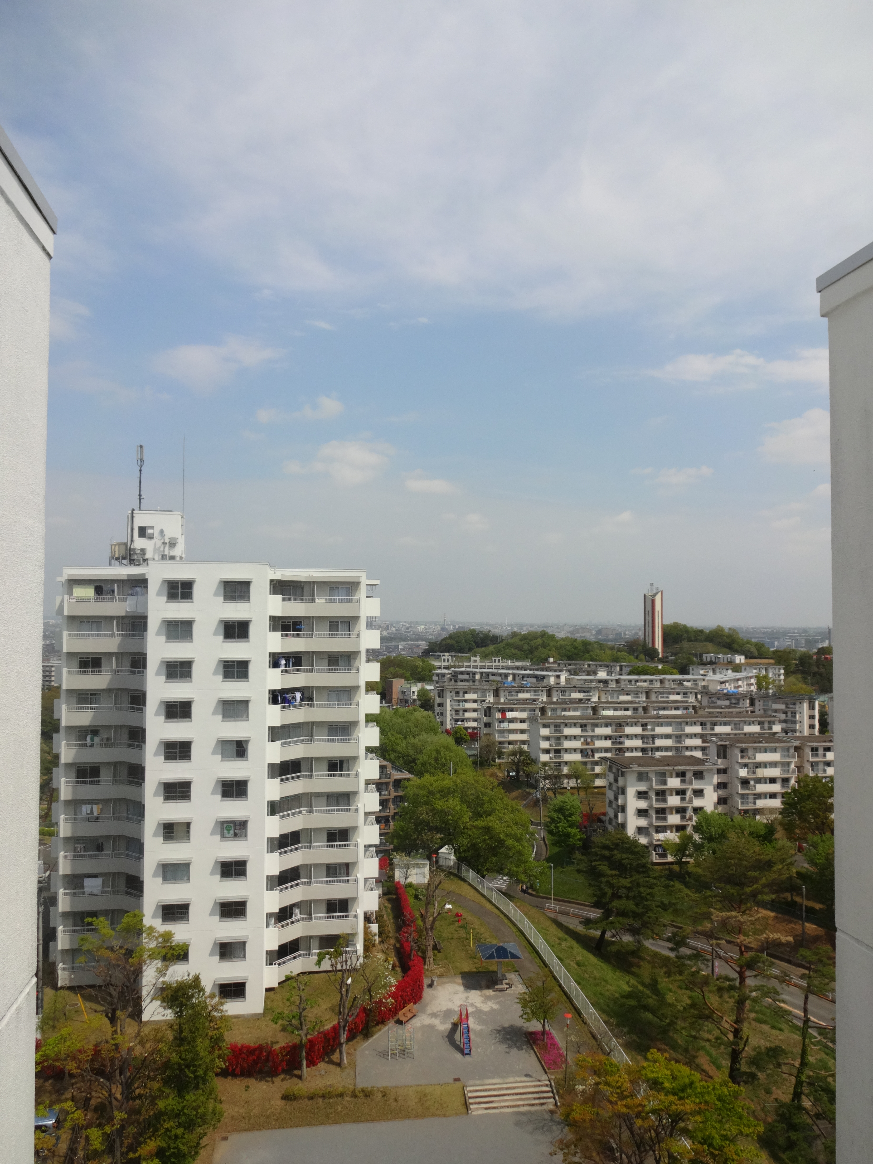 UR都市機構/百草団地1-5-3棟11階の景色。2019年（平成31年）4月21日撮影。